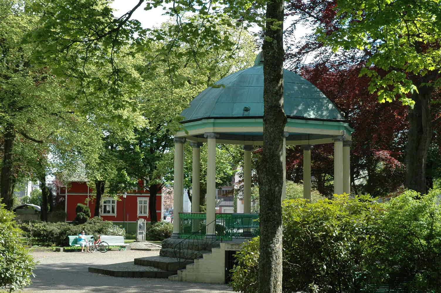 Byparken i Haugesund